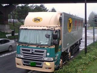 ヤマト運輸10t フルキャブ